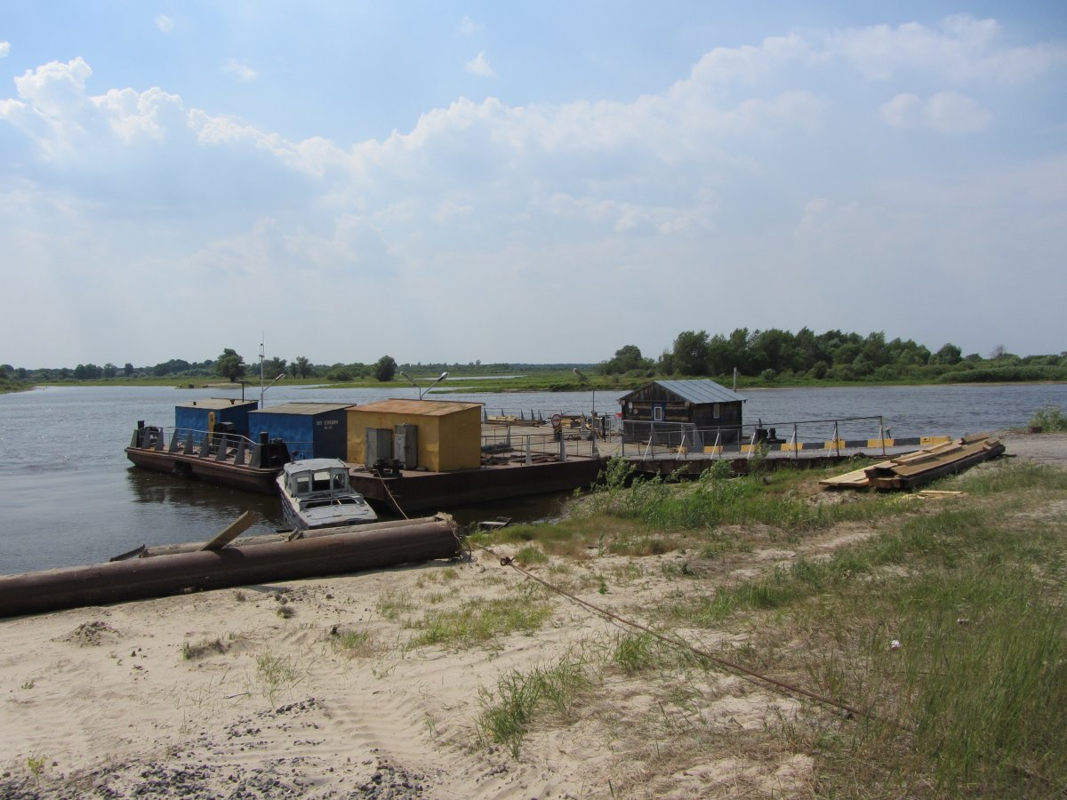 Паром Снядзін-Вышалаў цераз Прыпяць